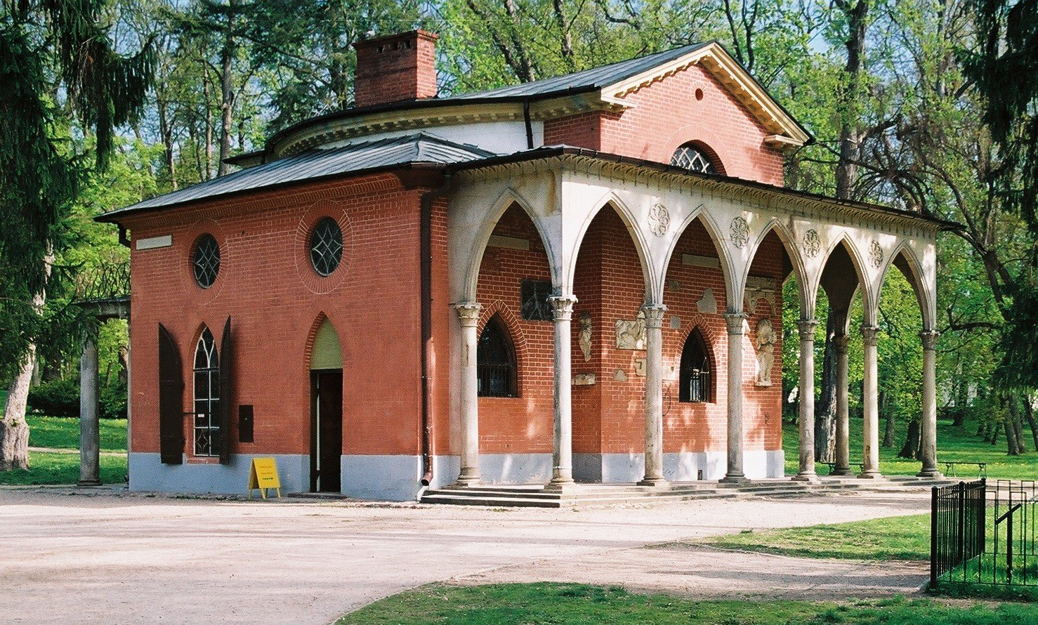 Domek Gotycki in Puławy, Poland; view from south-west, Świątynia Sybilli is behind